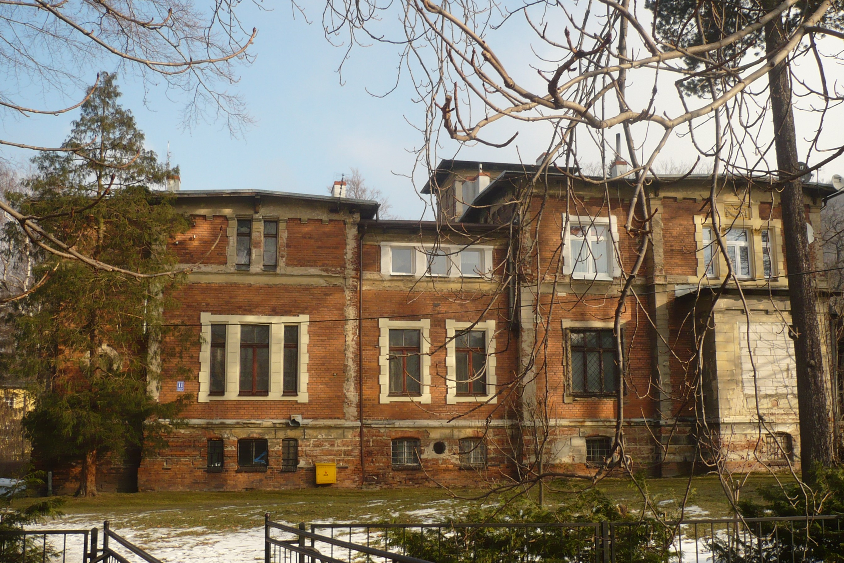 Walim, Willa Kościuszki 11, walimskiego fabrykanta Carla Wiesena